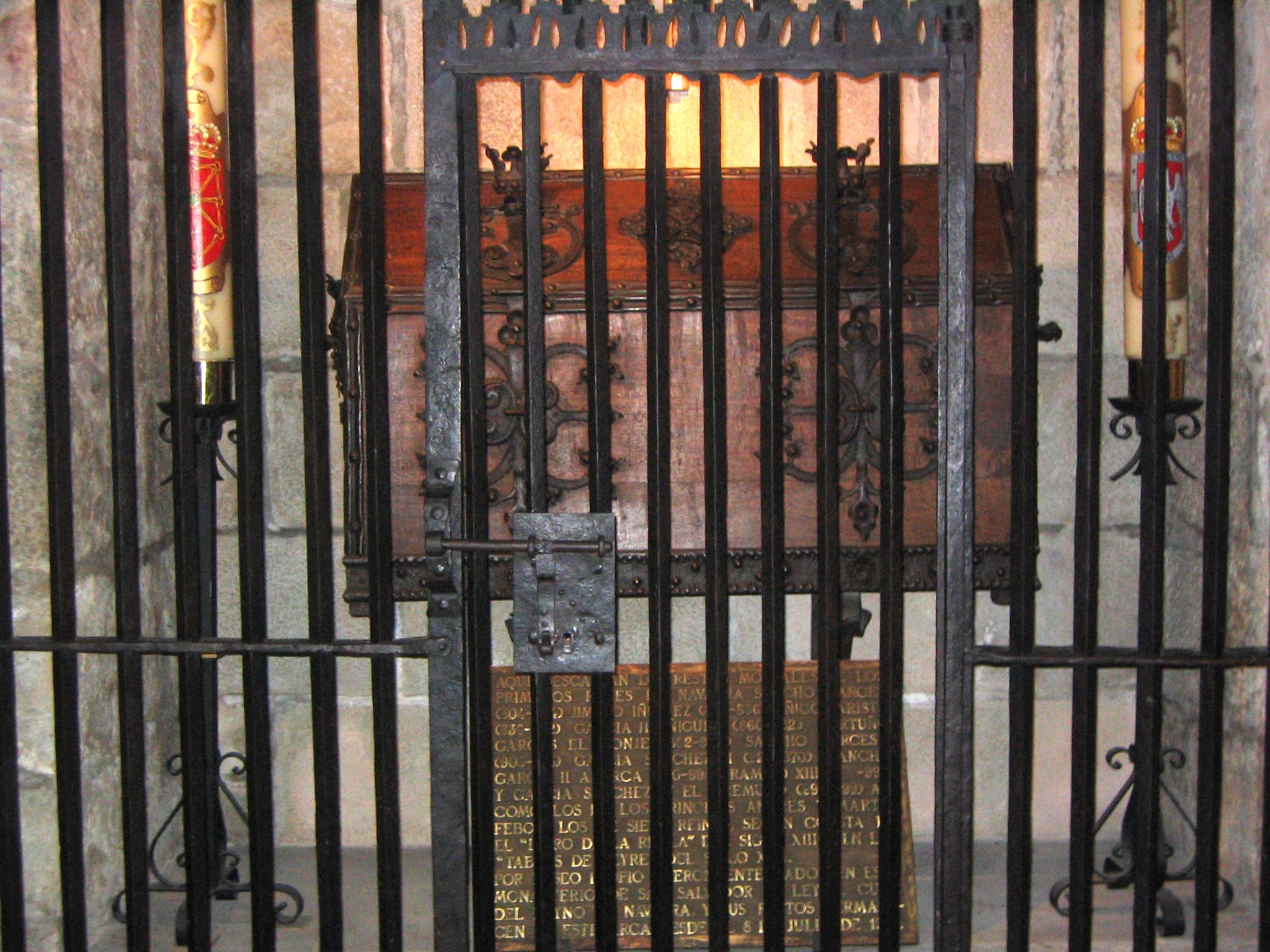 Monasterio de Leyre, panteón de los reyes navarros, Yesa, Navarra (España).